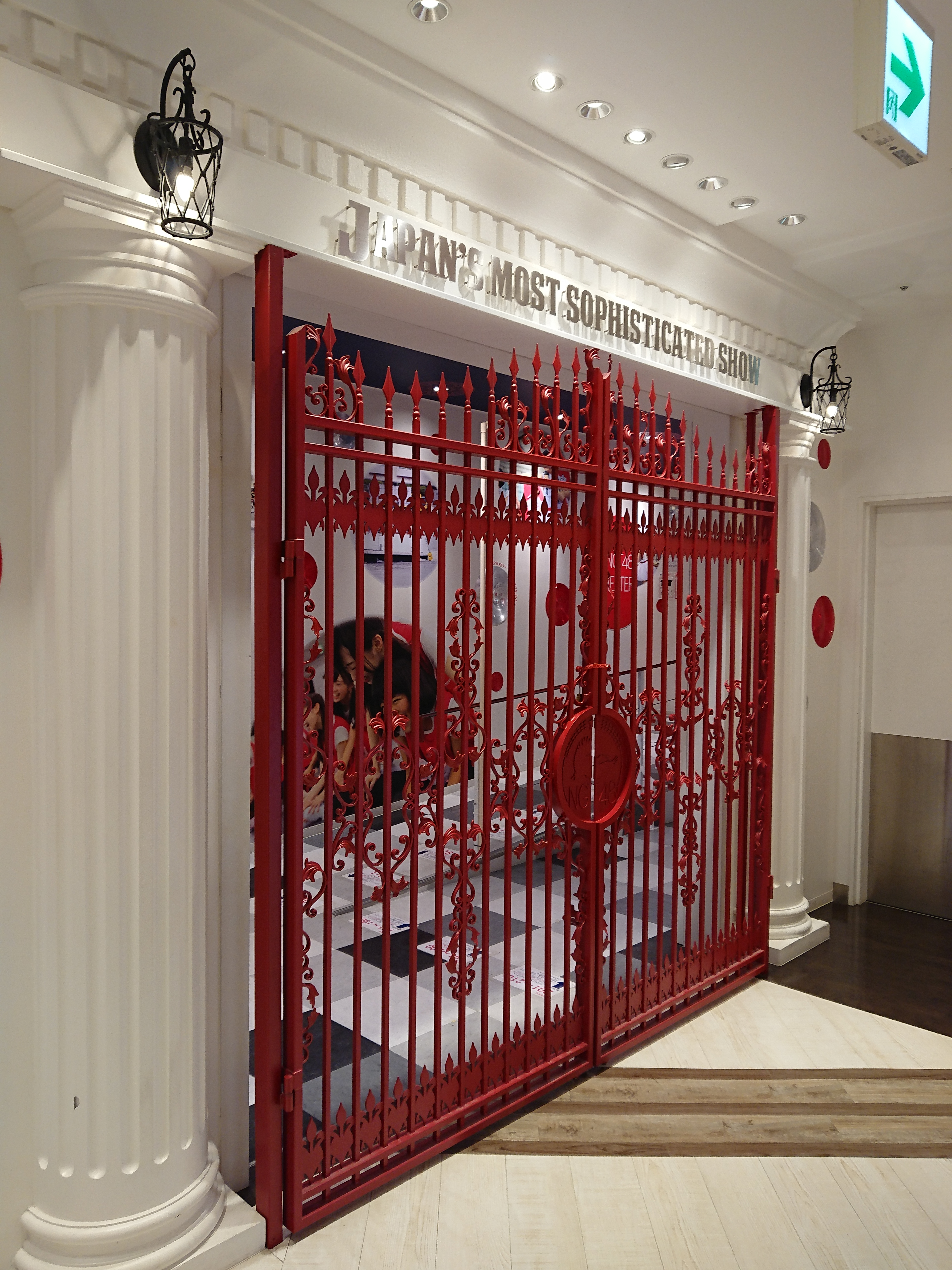 NGT48シアターの入口